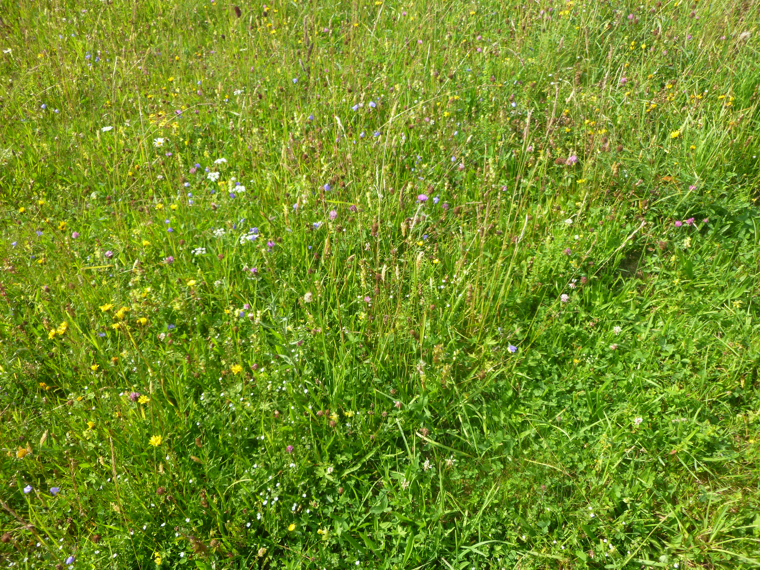 Artenreiche Wiesennahaufnahme im FFH-Gebiet Bergwiesen bei Winterberg im Bereich Westfalenhang im "Landschaftsschutzgebiet Grünlandhänge und -plateaus um Altastenberg / Neuastenberg / Langewiese / Hoheleye / Mollseifen".